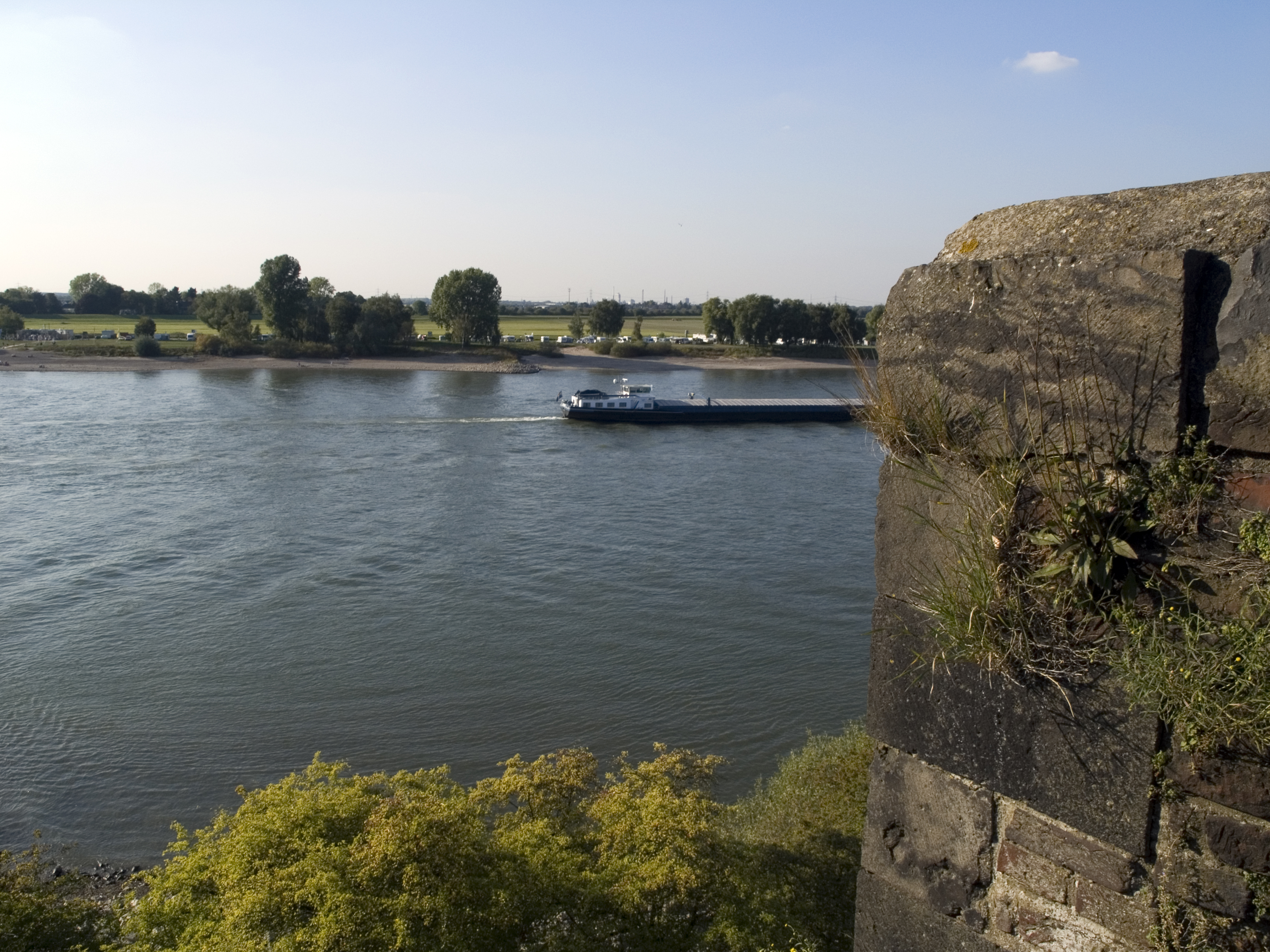 Северный Рейн - Вестфалия, Дюссельдорф - руины императорского дворца в Кайзерверте